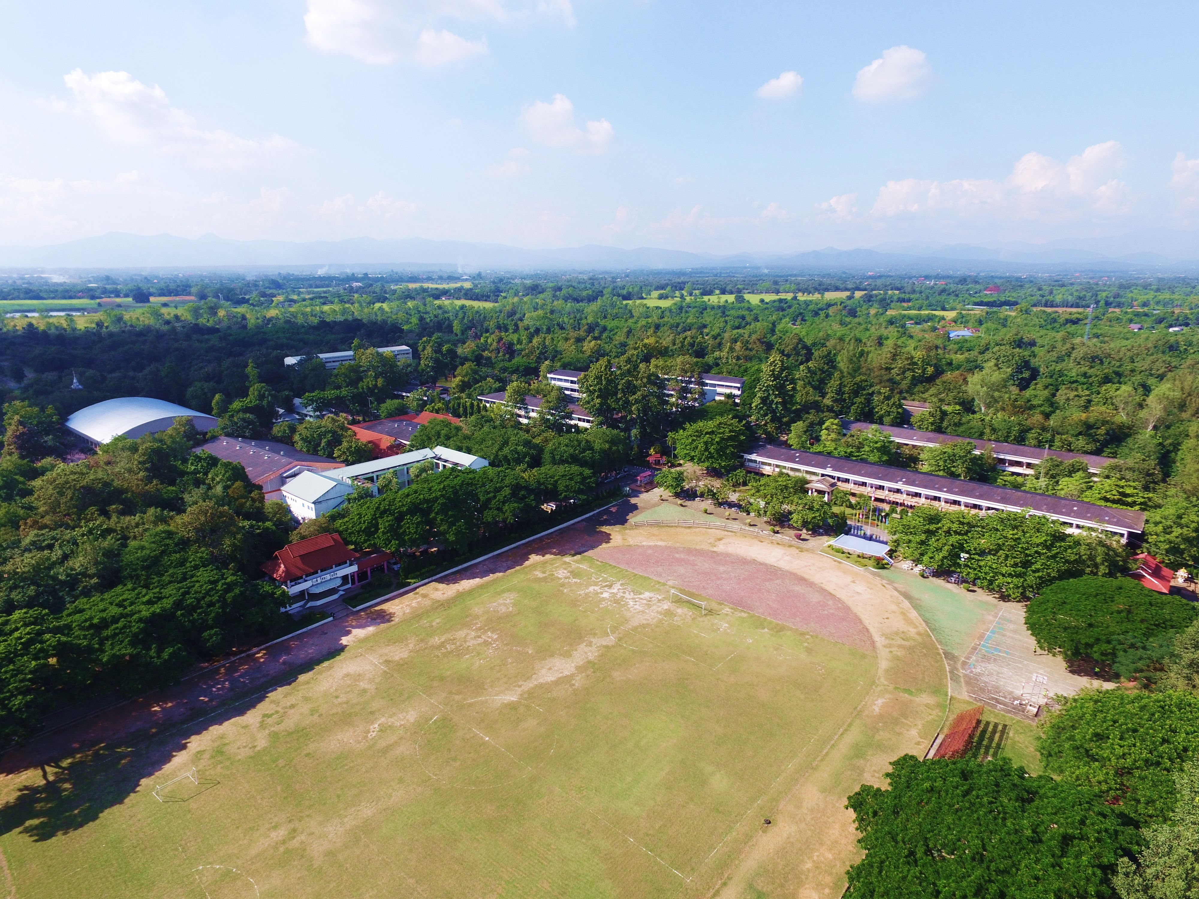 มุมสูง ร.ร.ส.ว.